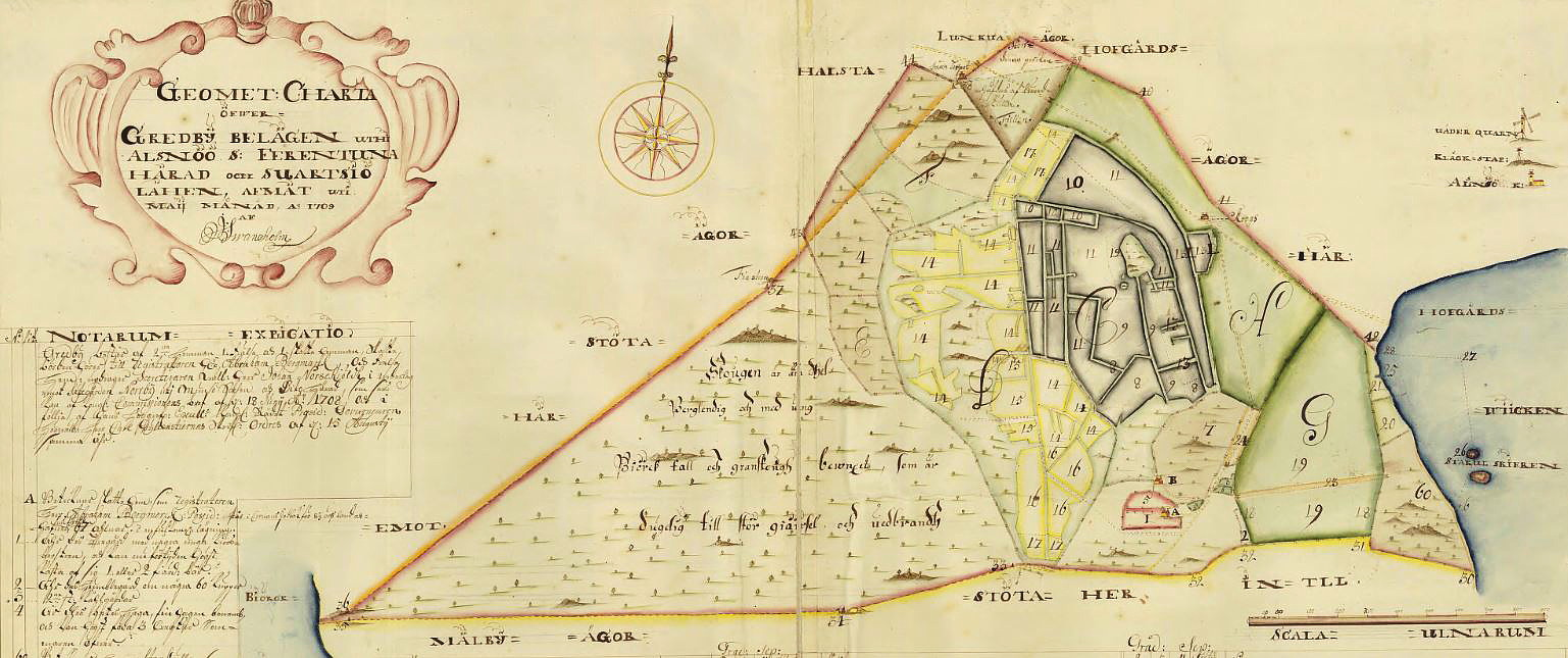 Karta över Gredbys ägor